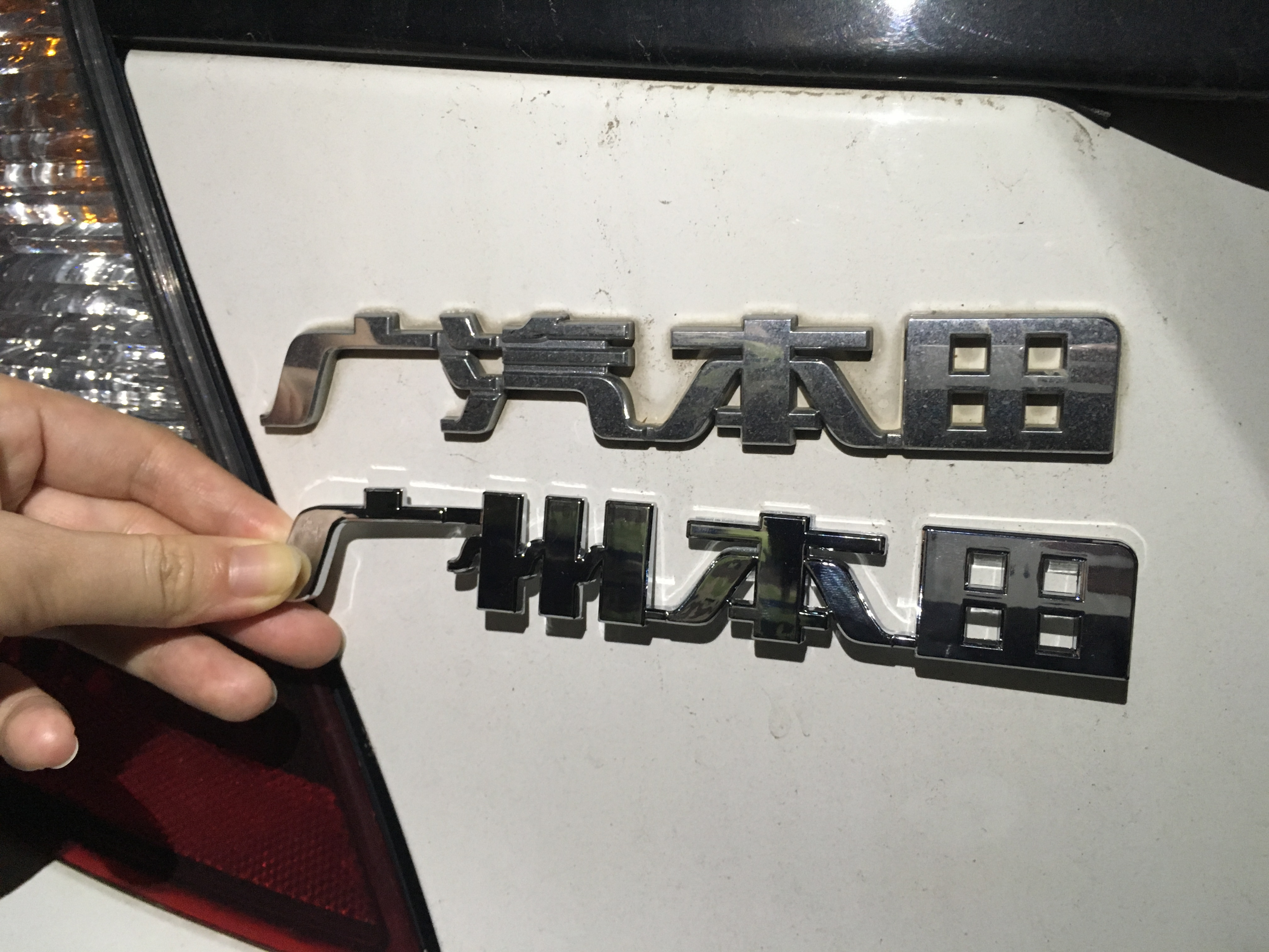 中文（中国大陆）: 广汽本田飞度fit2014款车尾标志与广汽本田飞度fit2011款标志的区别